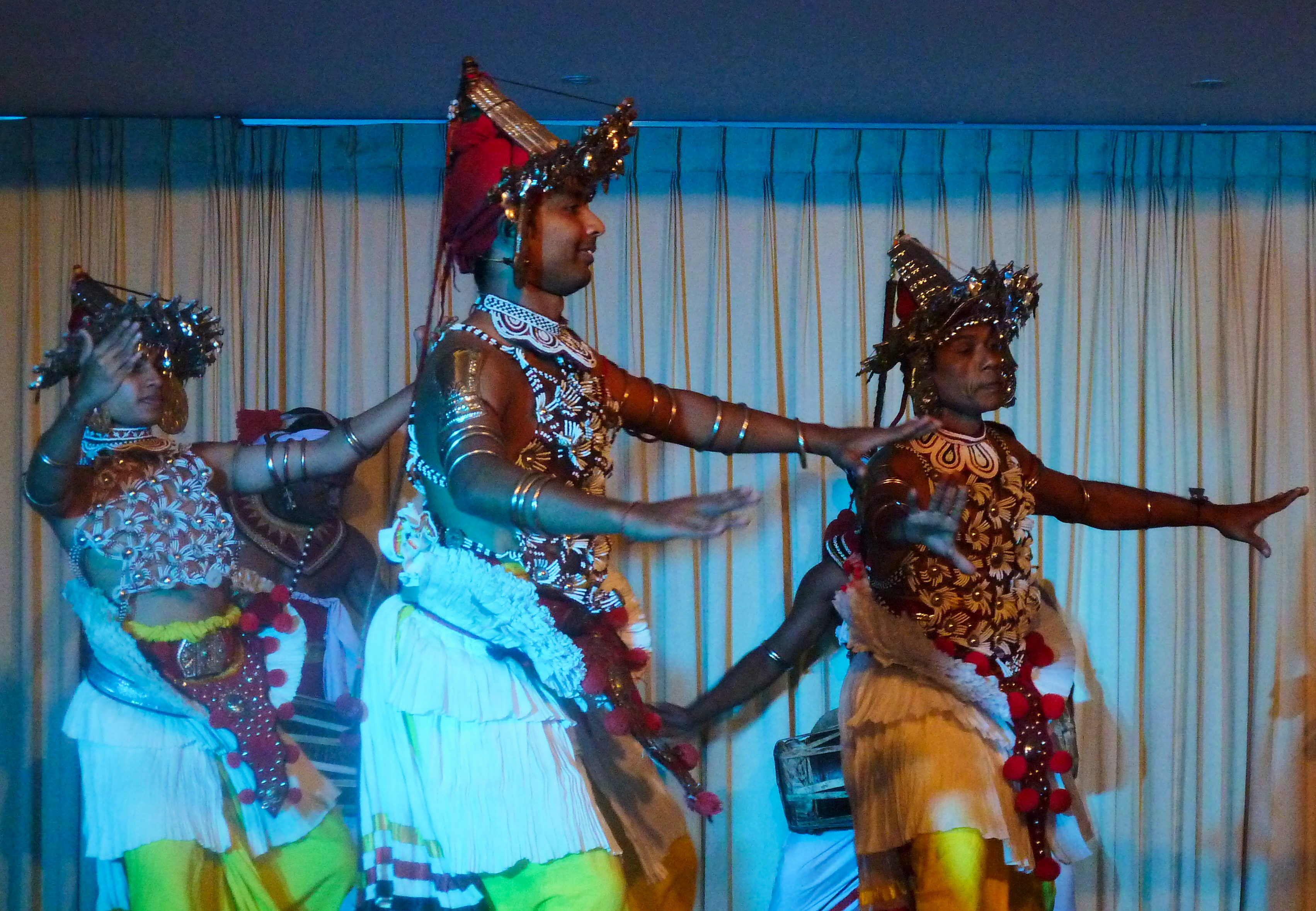 Oak- Ray Kadyan Dance à Kandy Sri Lanka.- Asie du Sud, la Ves Natuma est la danse traditionnelle la plus importante de Kandy. Elle symbolise les rayons du soleil et demande des années de formation pour que les danseurs l’interprètent correctement